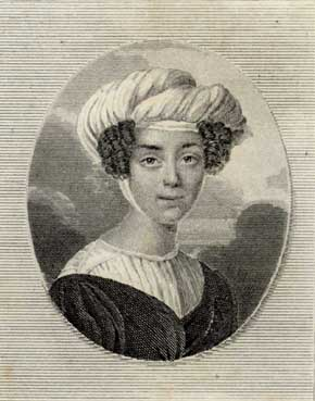 Claire de Duras, incisione, Coll. Societé Chateaubriand